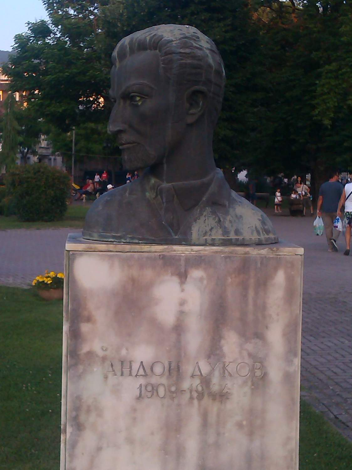 Биста на Андон Дуков во центарот на Охрид